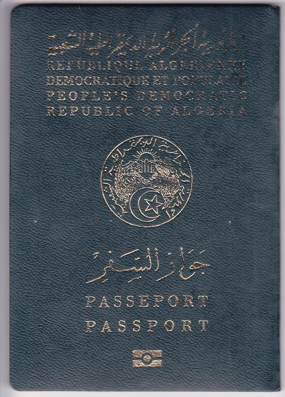 passeport biométrique algérien